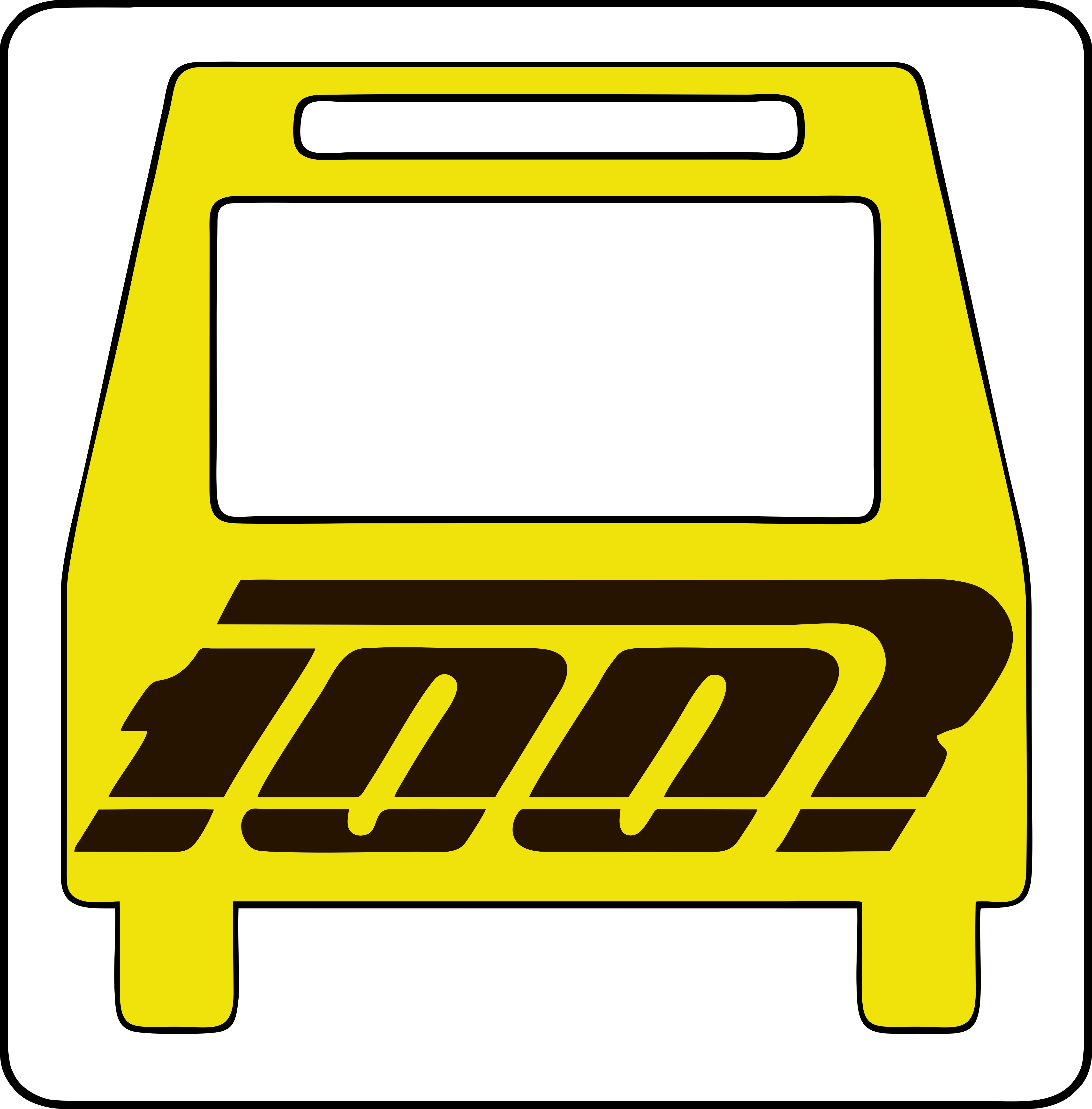 Parada Amarilla